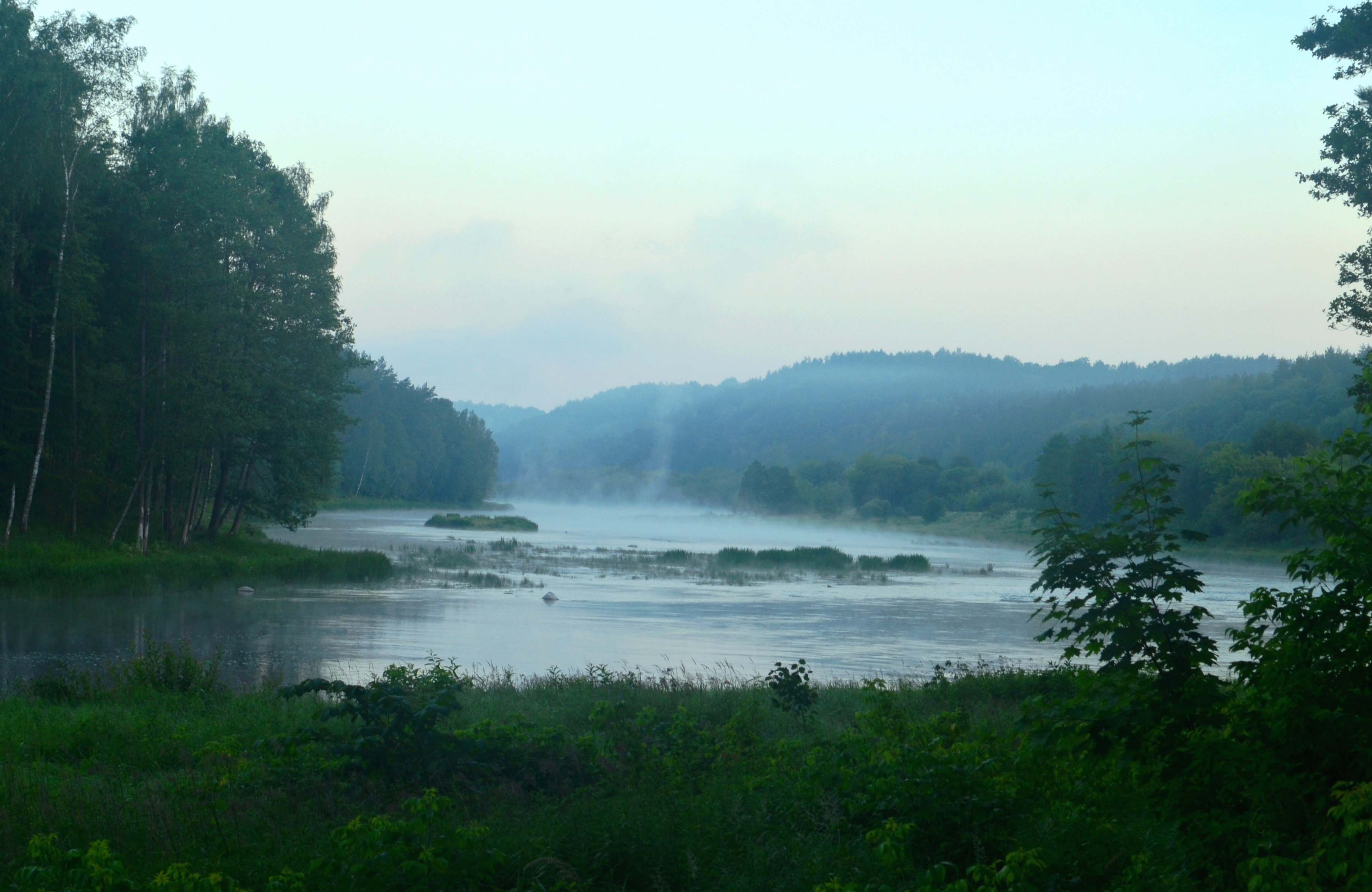 Aušra, Neries pakrantės, Karmazinų apylinkės, Vilniaus raj.